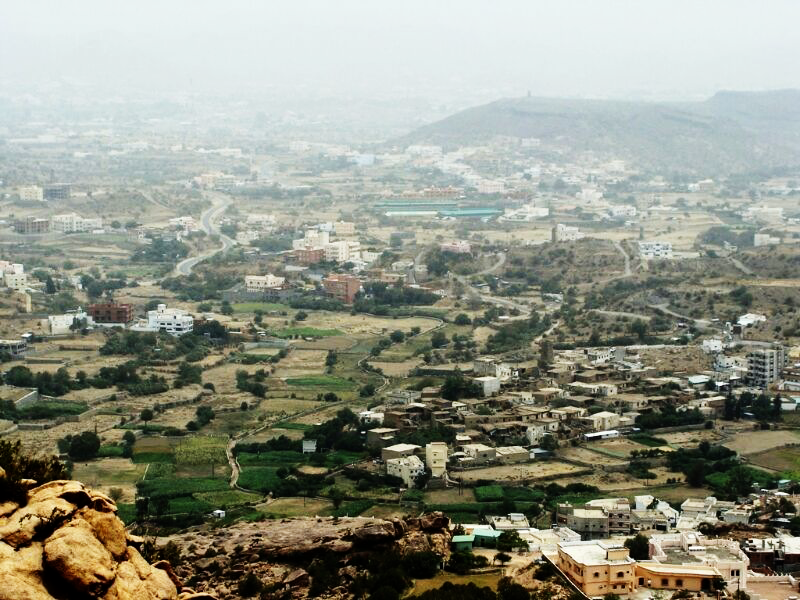 بلاد قبيلة حوالة